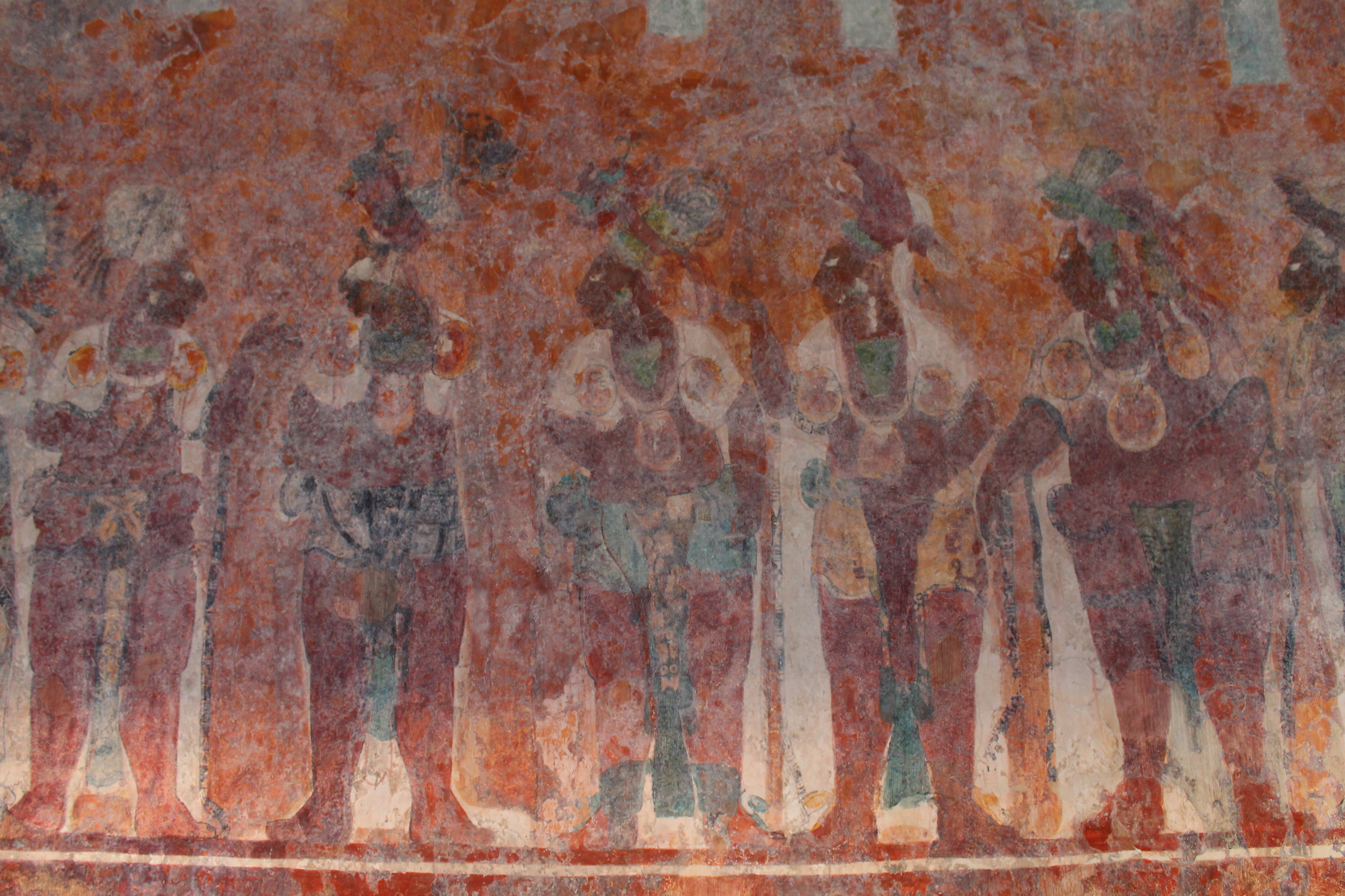 Pinturas ancestrales en mítica zona arqueológica de Bonampak, Chiapas.